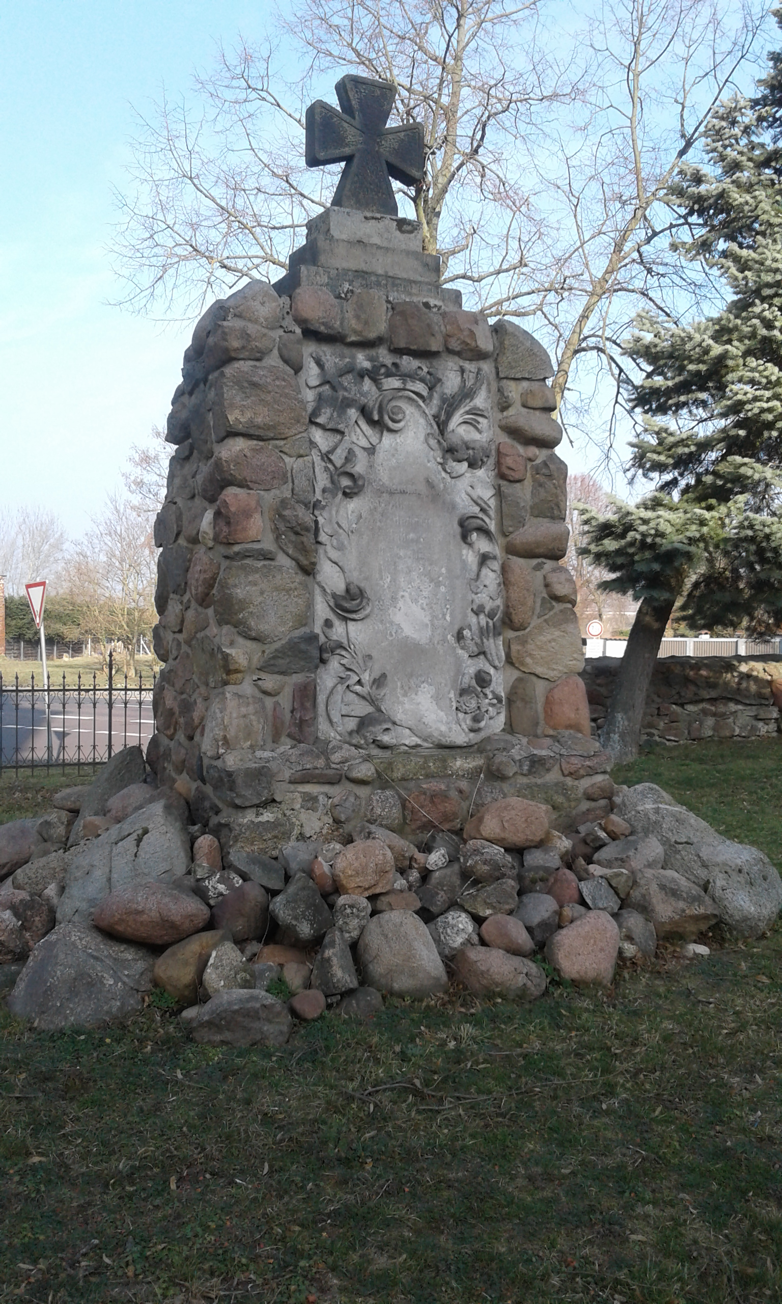 Kriegerdenkmal